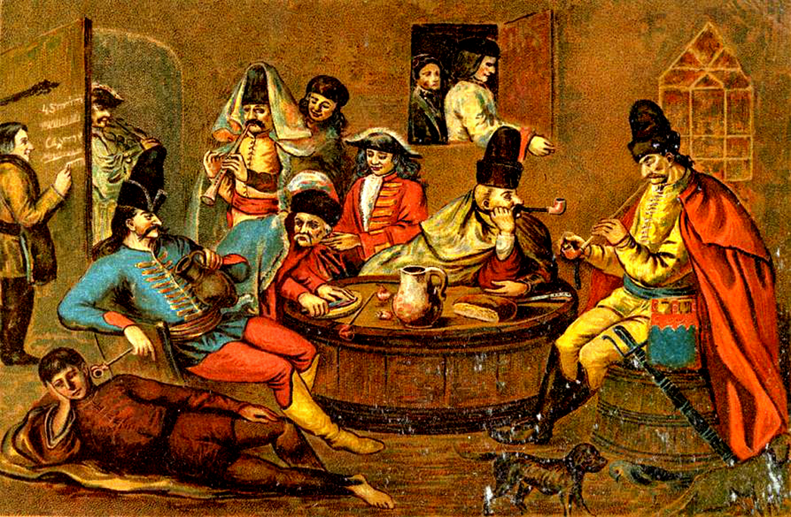 Iszogató, pipázó, tárogatómuzsikát hallgató kurucok - olajfestmény. Acsády Ignác: Magyarország története I. Lipót és I. József korában